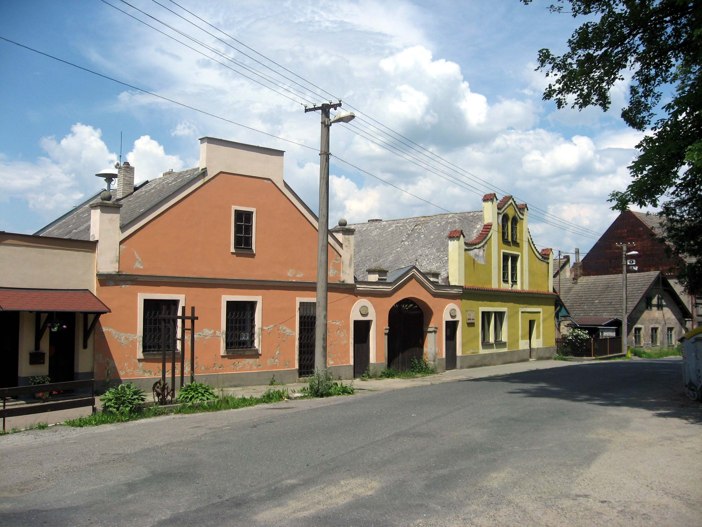 Úsobí